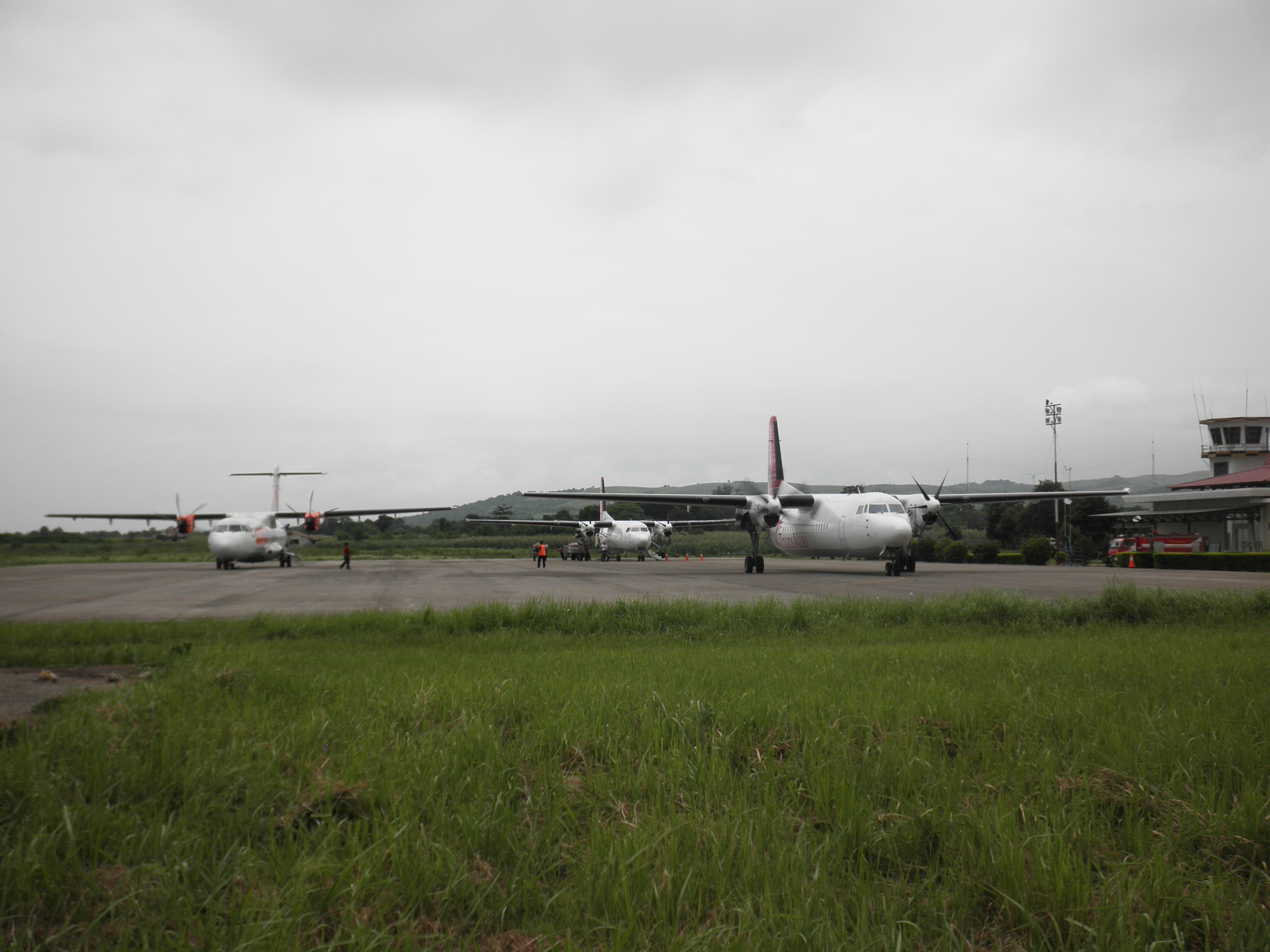 Radamata, Loura, Southwest Sumba Regency, East Nusa Tenggara, Indonesia